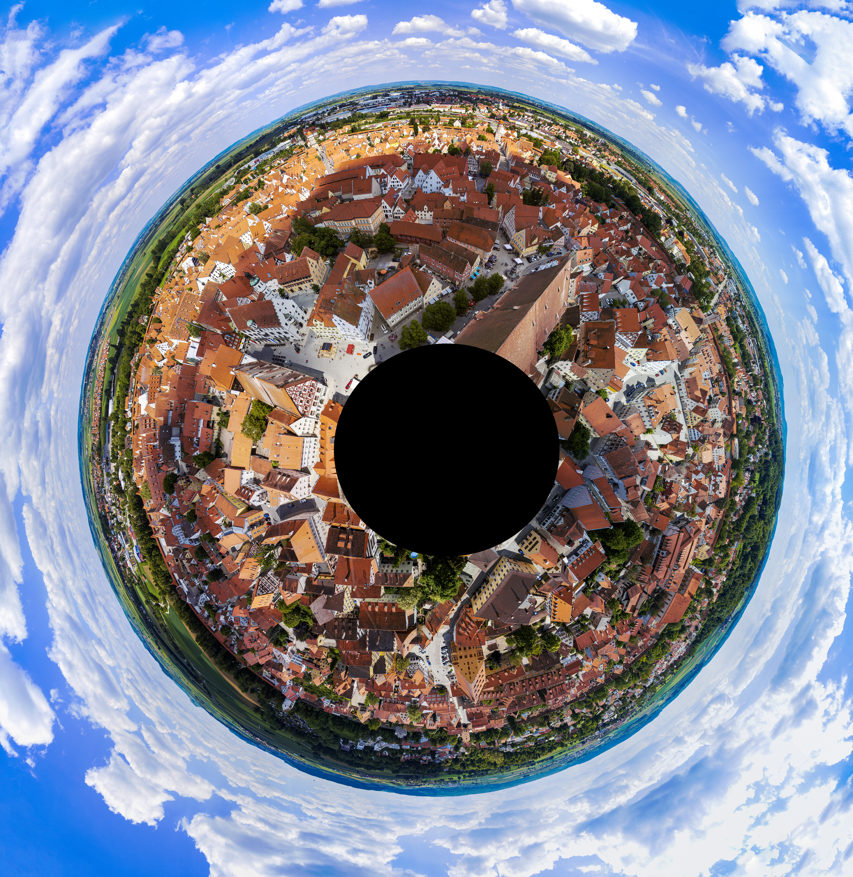 Ein "Little Planet"-Panorama welches vom Kirchturm "Daniel" aufgenommen wurde.